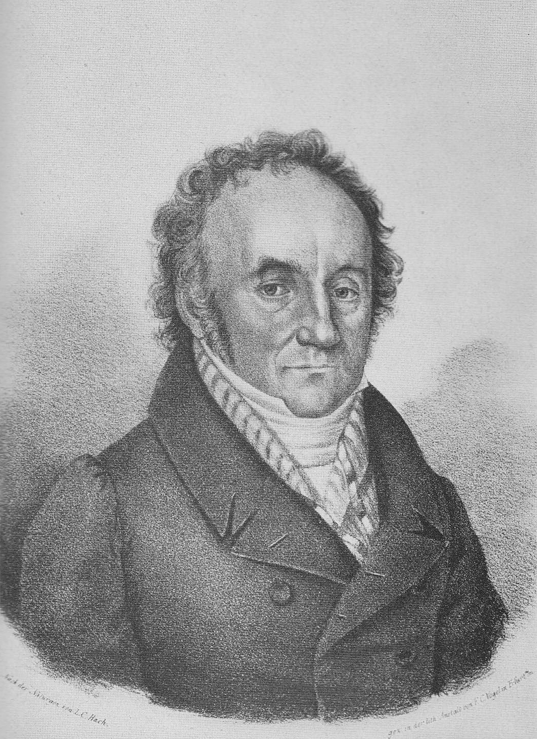 Ferdinand Freihherr Schenck zu Schweinsberg